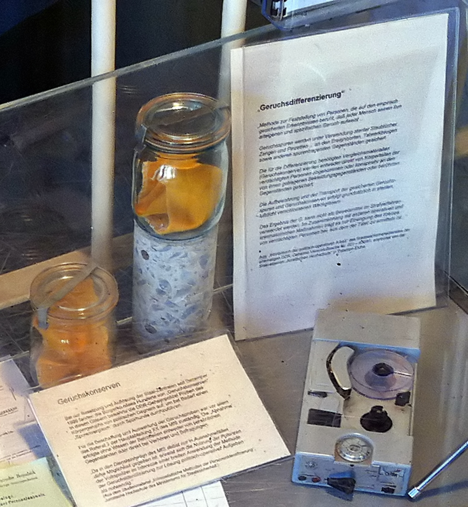 Hansestadt Rostock, Mecklenburg-Vorpommern, Deutschland: Geruchskonserven in einer Vitrine mit Exponaten der Dokumentations- und Gedenkstätte in der ehemaligen Untersuchungshaftanstalt des Ministeriums für Staatssicherheit (MfS) der Deutschen Demokratischen Republik (DDR); Hermannstraße 34b, Zellentrakt im 1. OG (Zugang über Augustenstraße/Grüner Weg), Hofseite vom „Haus der Justiz“. Die Gedenkstätte befindet sich auf dem ehemaligen Gelände der Bezirksverwaltung des Ministeriums für Staatssicherheit.